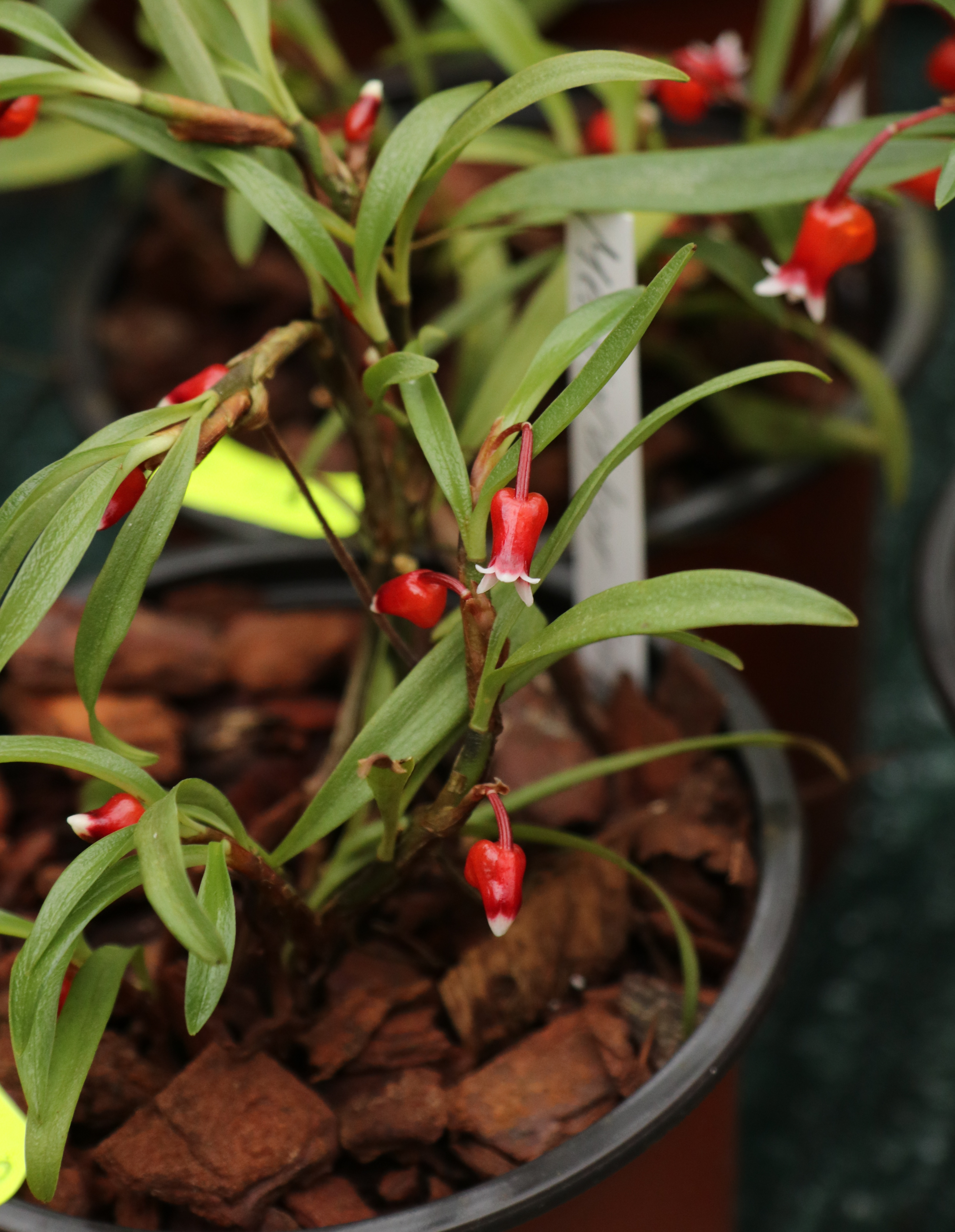 Mediocalcar bicolor auf der Orchideenschau 2018 im Botanischen Garten Leipzig